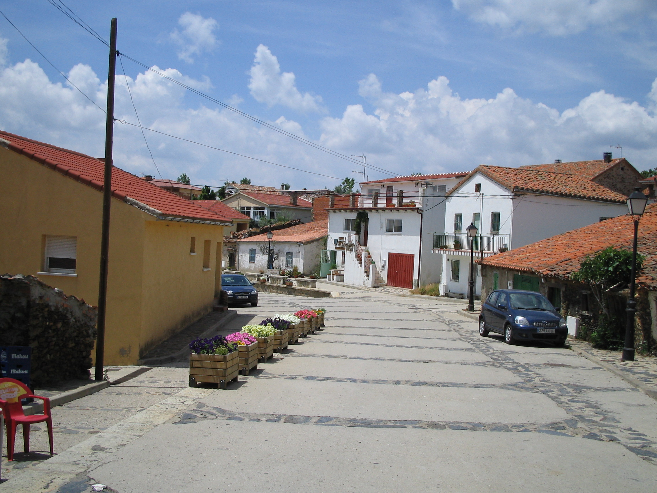 Entrada a El Atazar.